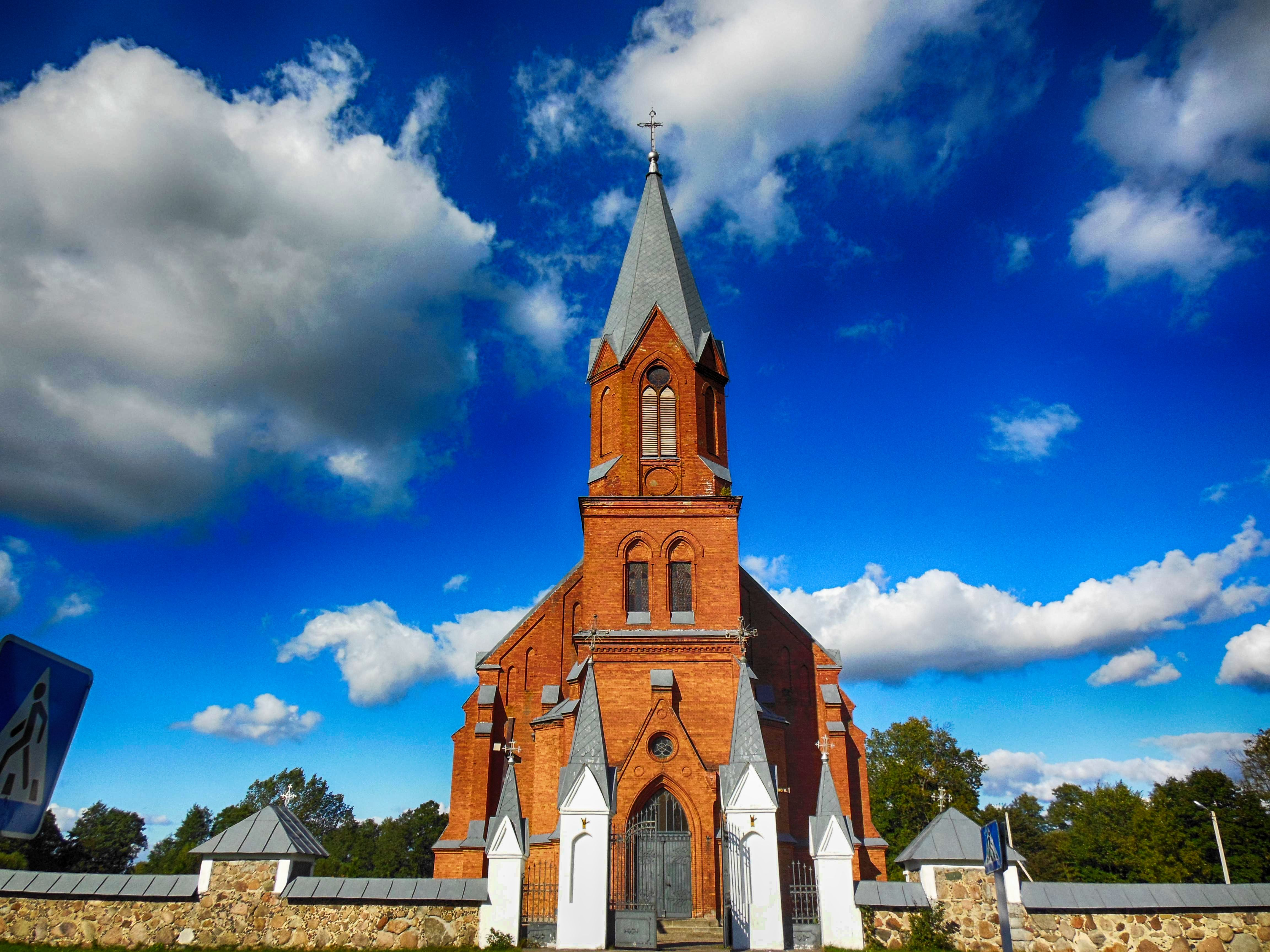 Касцёл св. Уладзіслава ў Суботніках Беларуская (тарашкевіца): Суботнікі, касьцёл сьв. Уладыслава